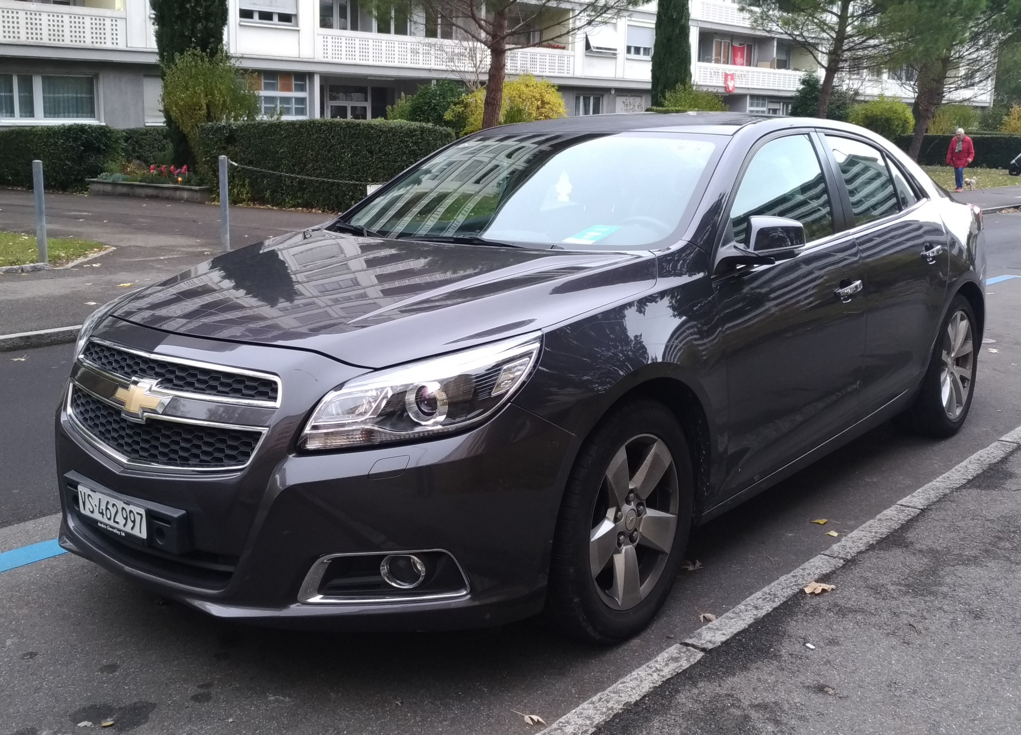 Chevrolet Malibu